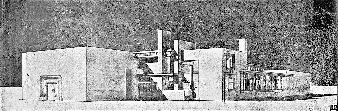 J.J.P. Oud, projet d'usine présenté à la galerie L'Effort moderne à Paris en 1923 (image du domaine public modifiée)